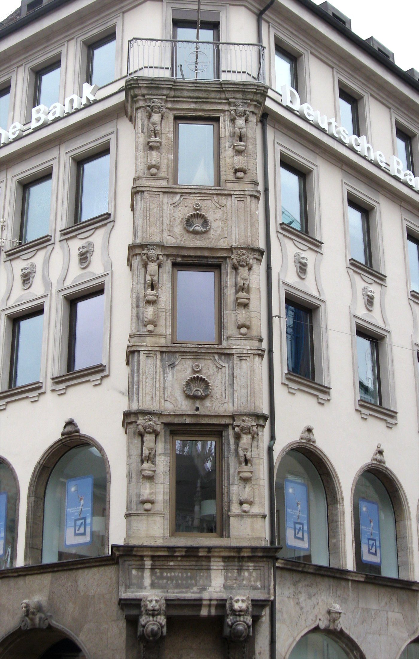 Marienplatz 21; Wohn- und Geschäftshaus, fünfgeschossiger Eckbau mit Arkaden im natursteinverkleideten Erdgeschoss und Naturstein-Eckerker, in historisierenden Formen, von Georg Meister und Oswald Eduard Bieber, 1911.